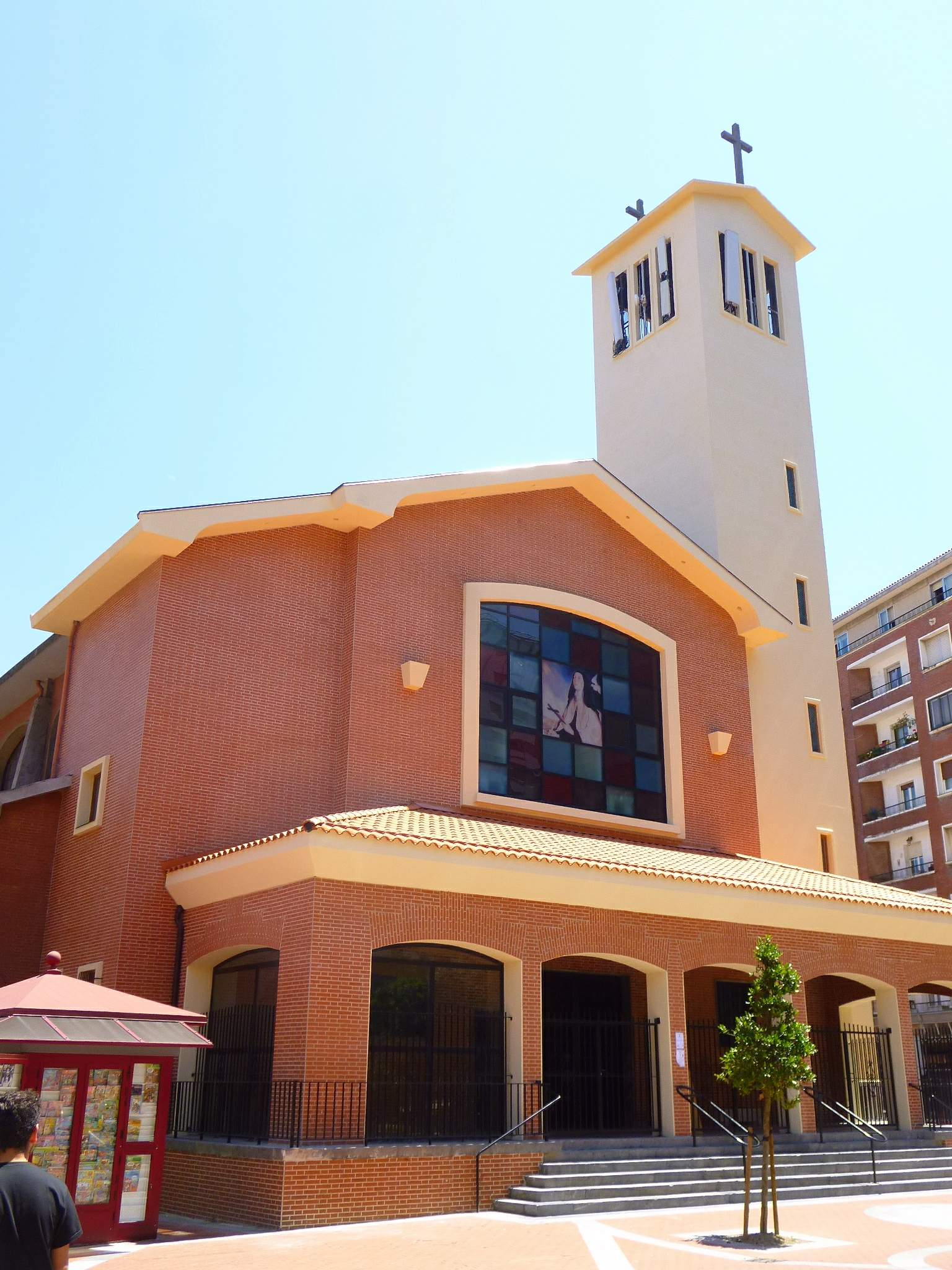 Iglesia de Santa Teresa (Barakaldo)